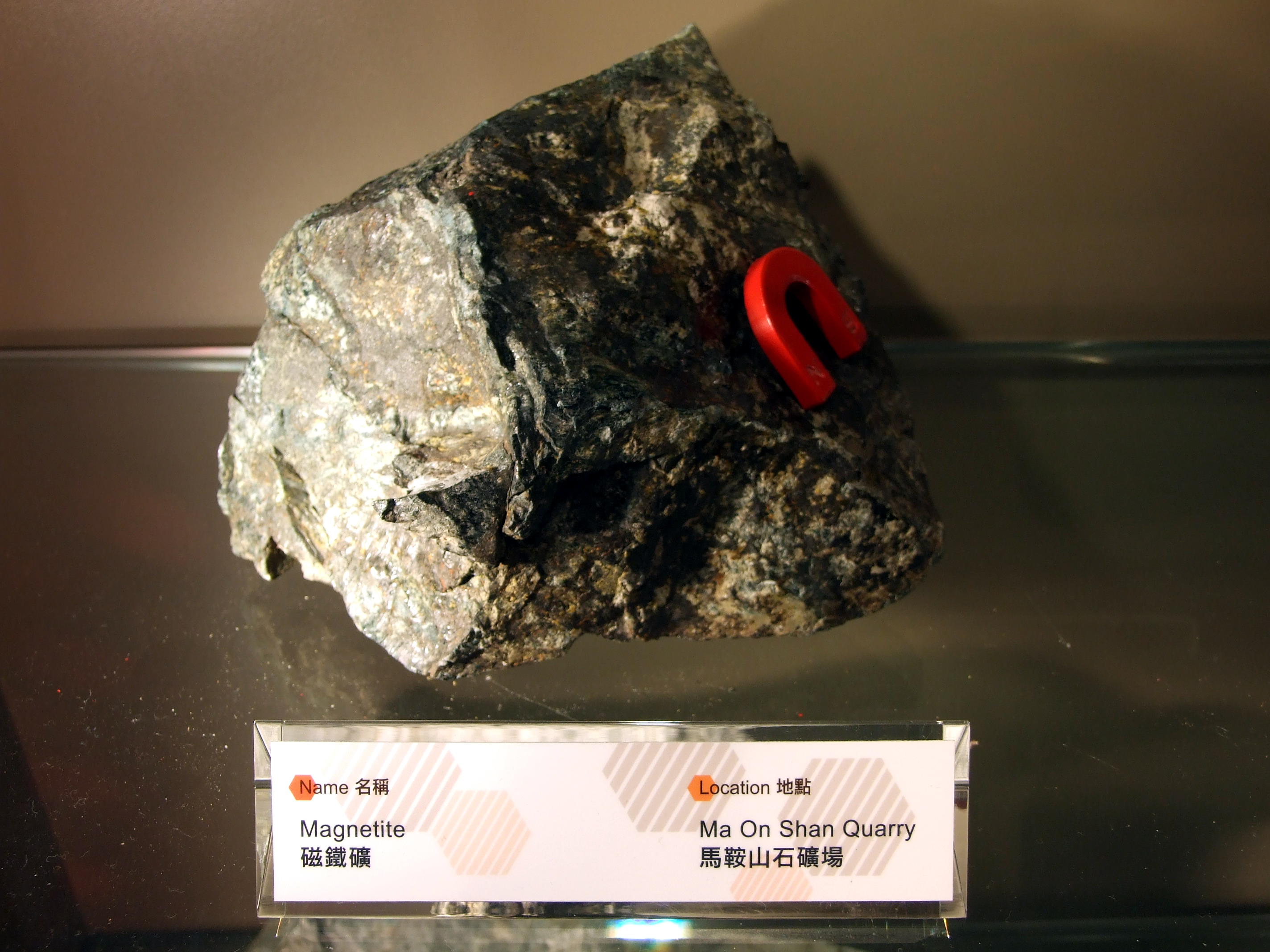 中文（香港）: 西貢蕉坑香港國家地質公園遊客中心展出的馬鞍山出產的磁鐵礦